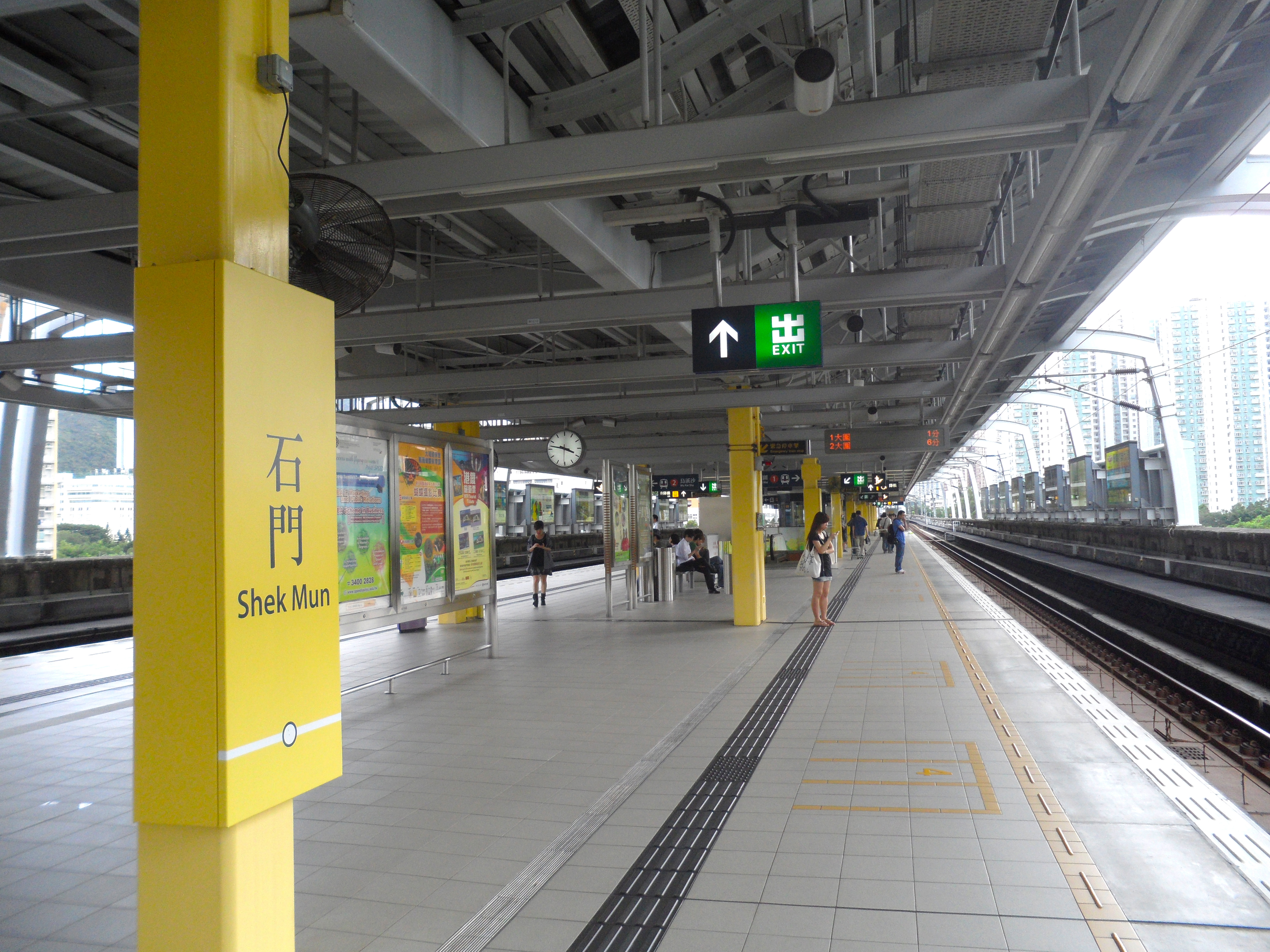 港鐵石門站一號月台